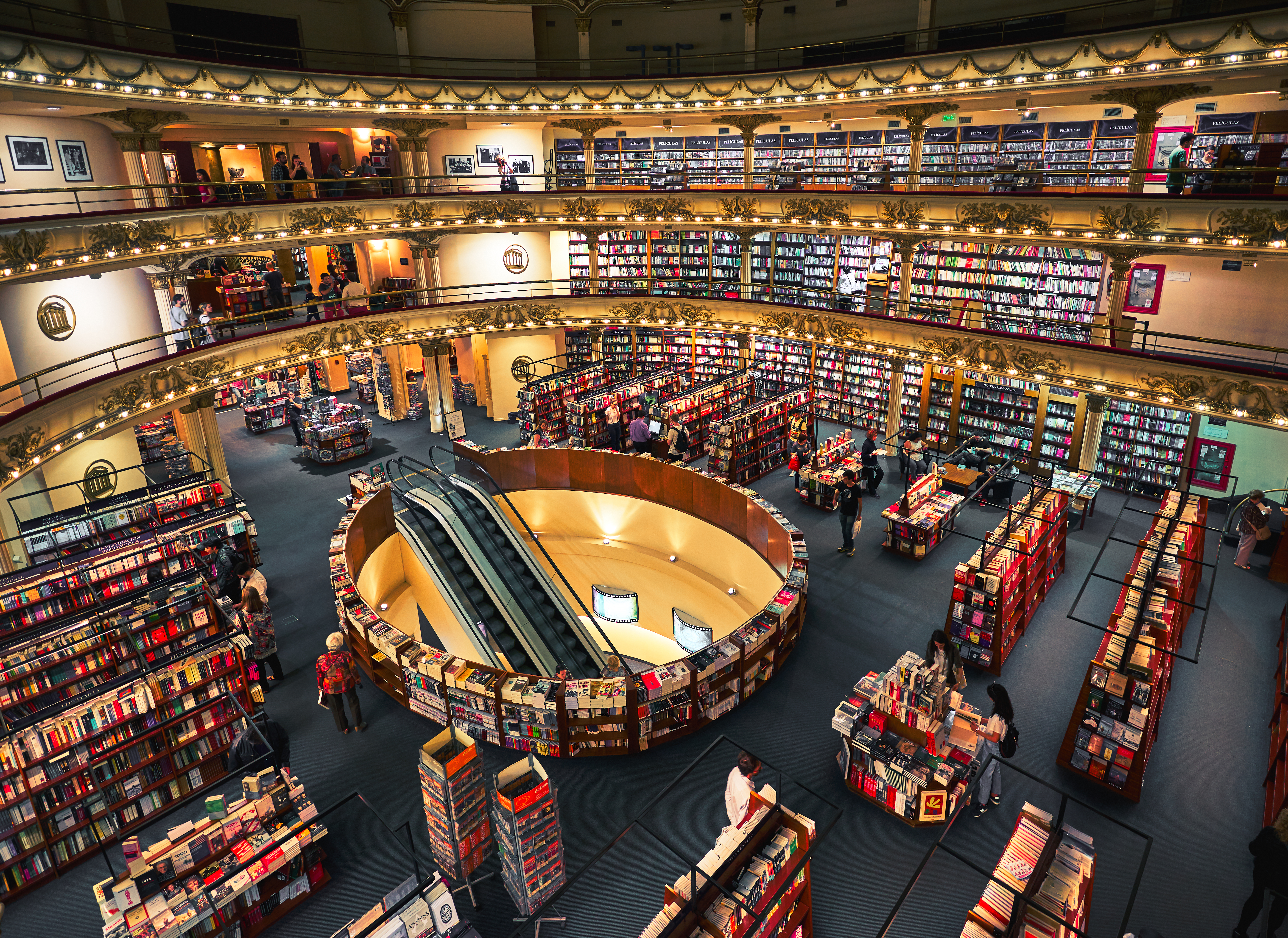 El Ateneo Grand Splendid, Buenos Aires